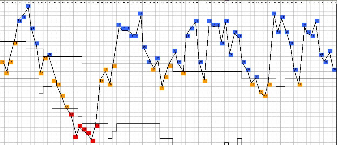 Evolución histórica del Betis en Liga